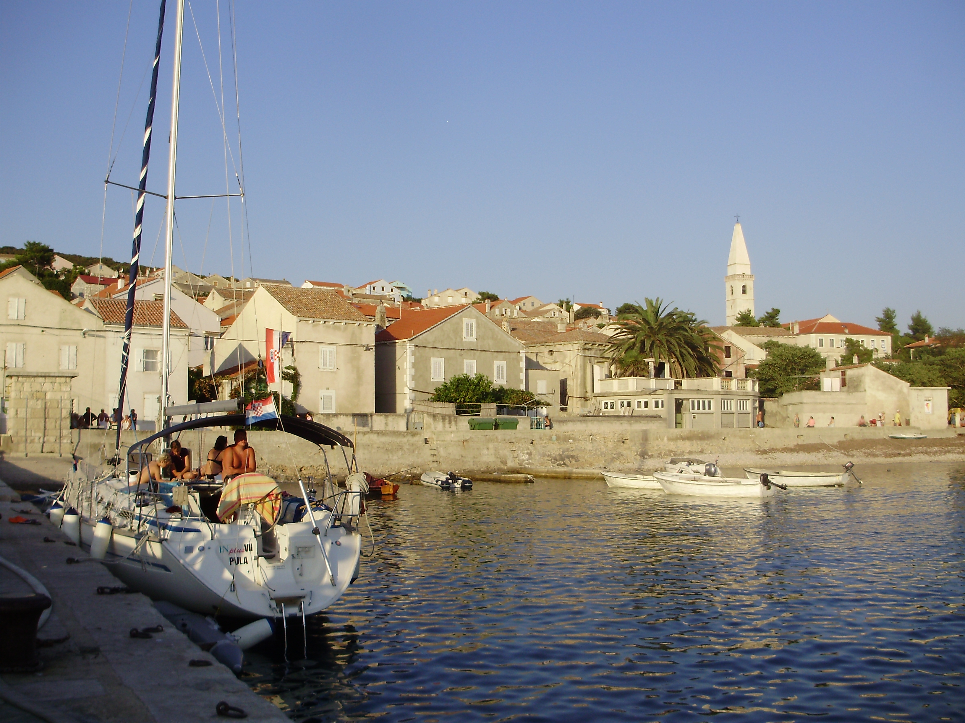 unije mol